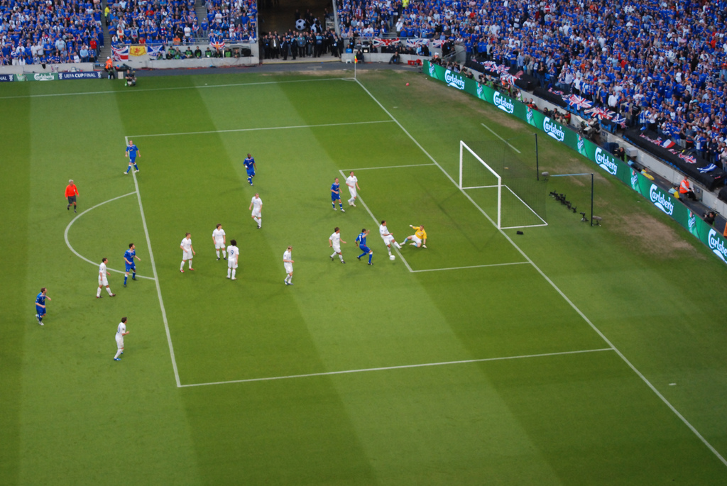 Zenit St. Petersburg im Finale des UEFA-Pokals, 14. Mai 2008. Foto: George Groutas.